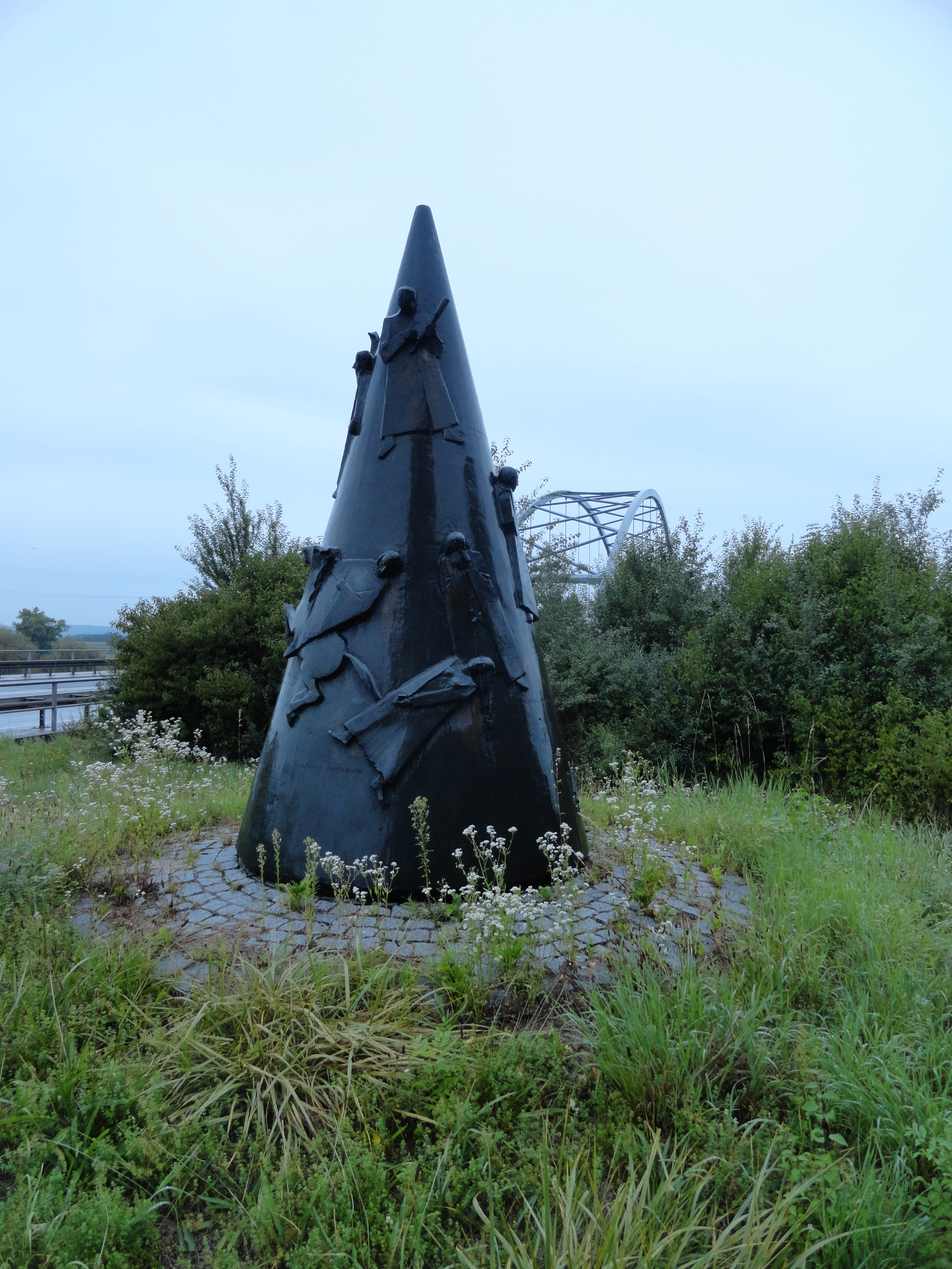 Brückenplastik Geschichtskegel von Rolf Nida-Rümelin bei der Brücke über die Donau in Straubing im Verlauf der Bundesstraße 20